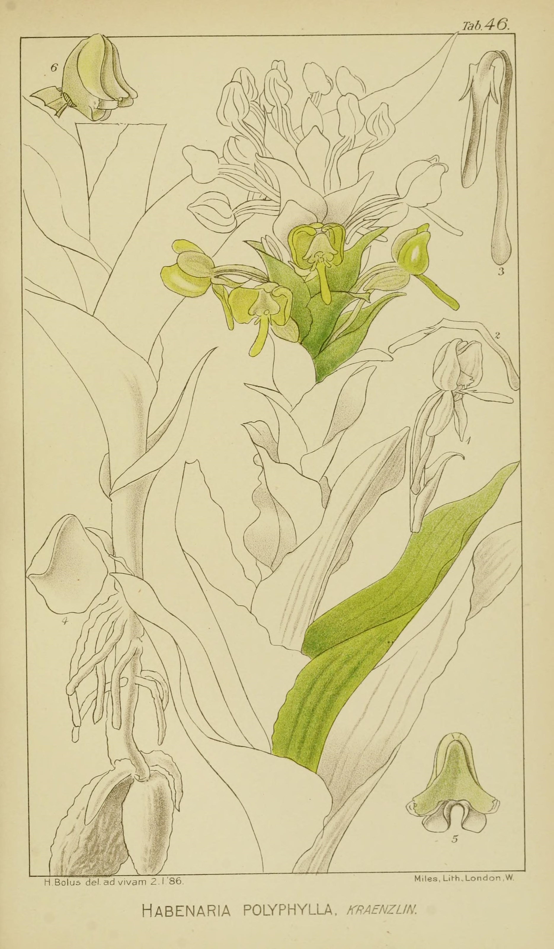 Tab.46. H Bolus del. ad vivam 2.1 '86. Miles, Lil-h, London ,W Habenaria POLYPHYLU, KRAENZLIN.